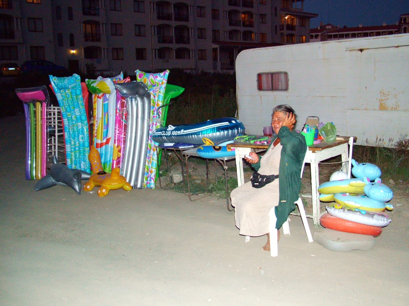 Bulgarian Gipsy selling bathing toys